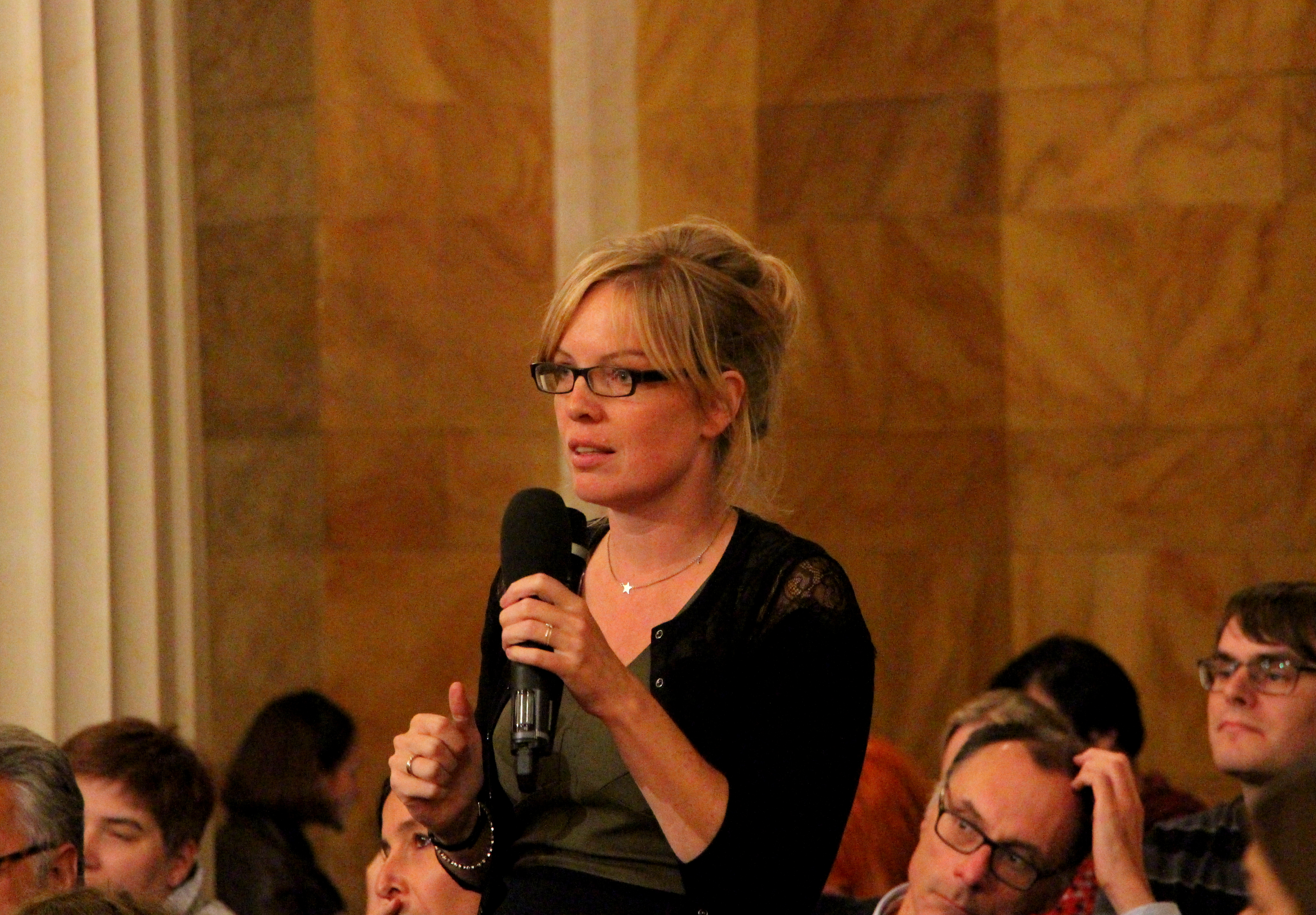 Historikertag 2014 in Göttingen. Beatrice de Graaf.